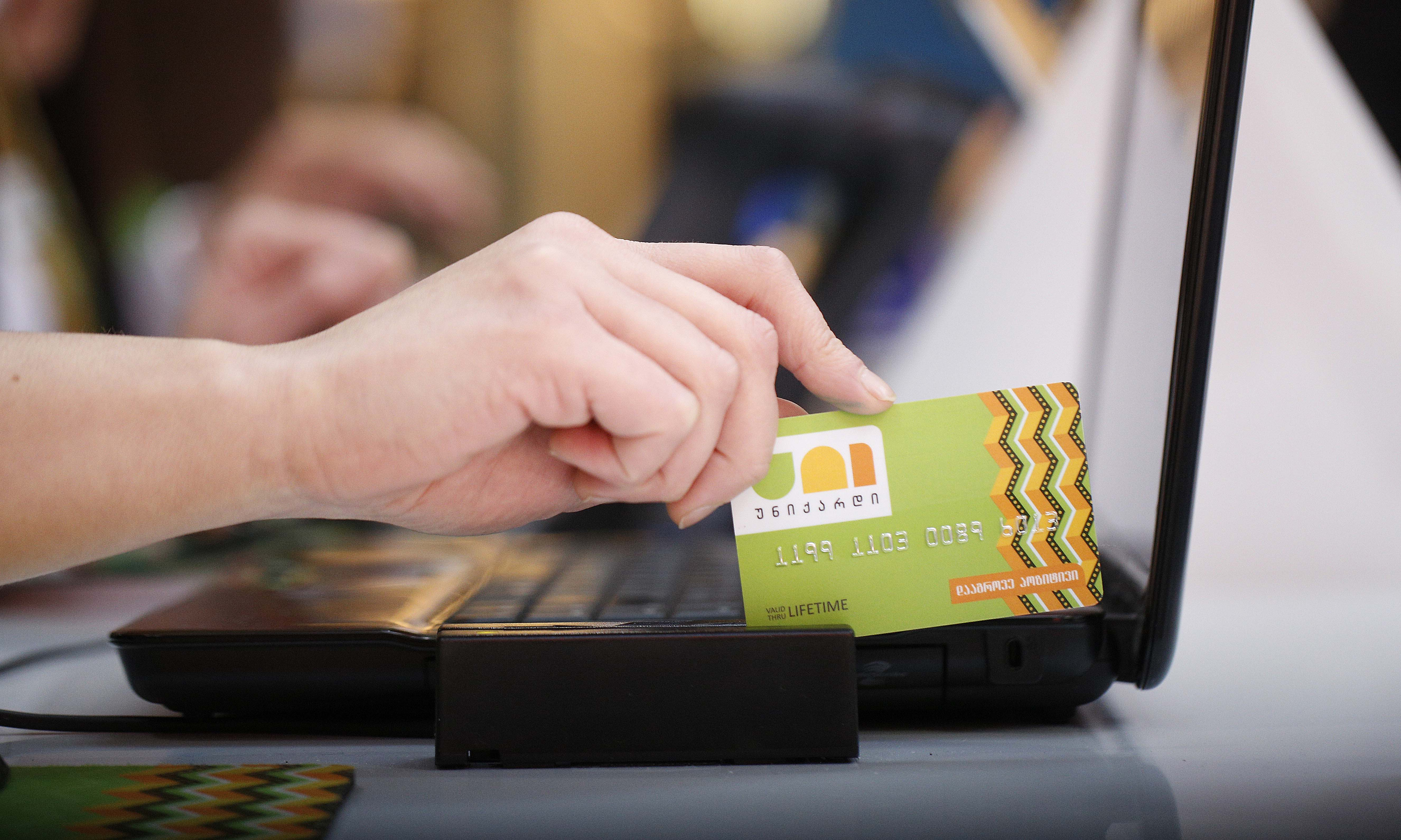 ბონუს ქულების დაგროვება ვირტუალური და ფიზიკური ბარათებით არის შესაძლებელი